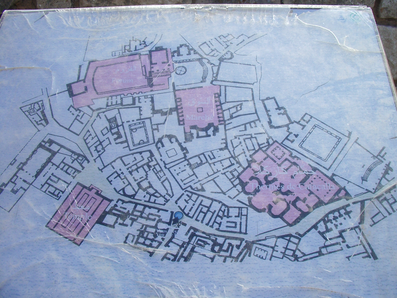 Dougga planol